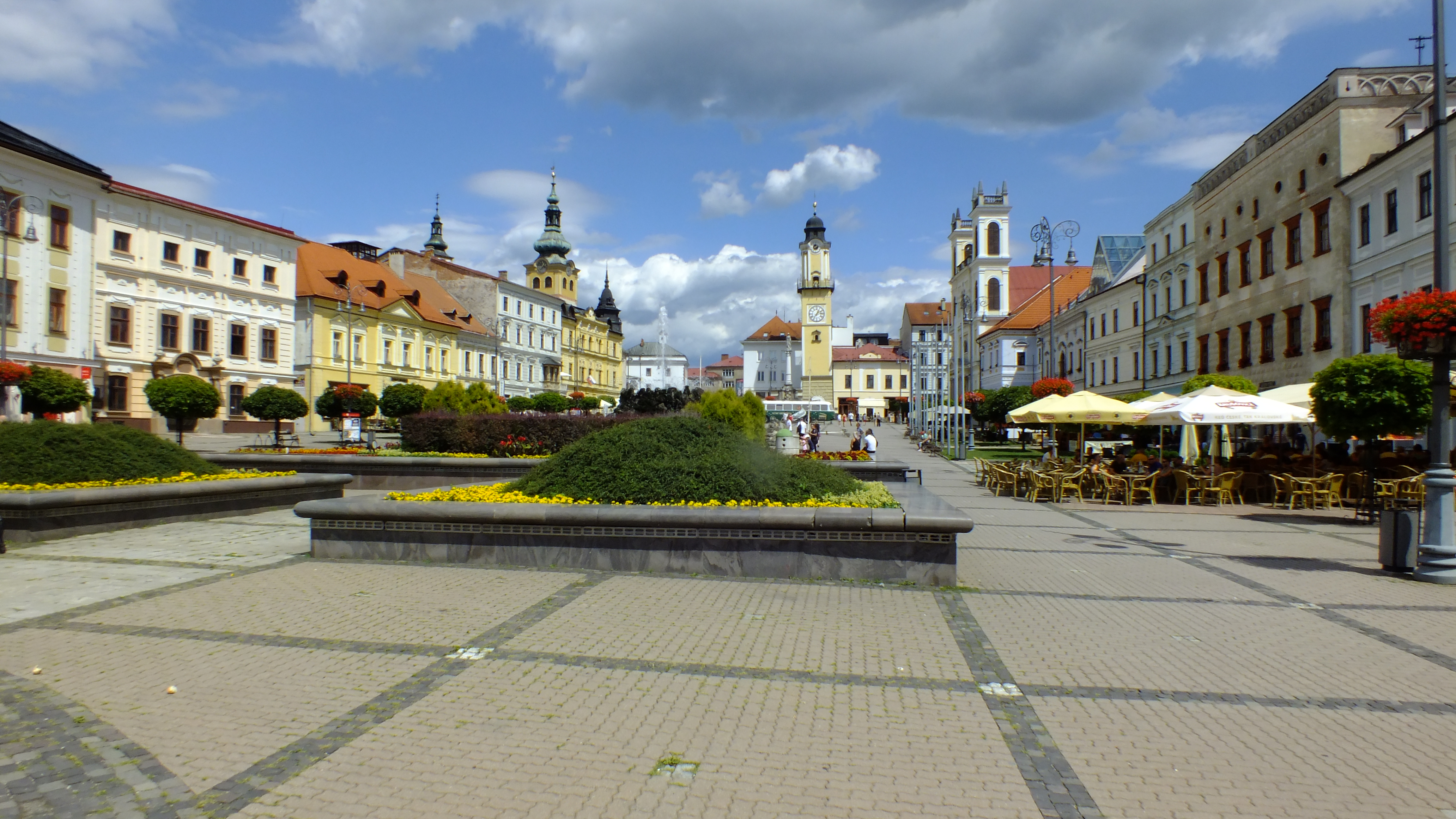 Hlavní náměstí v Banské Bystrici